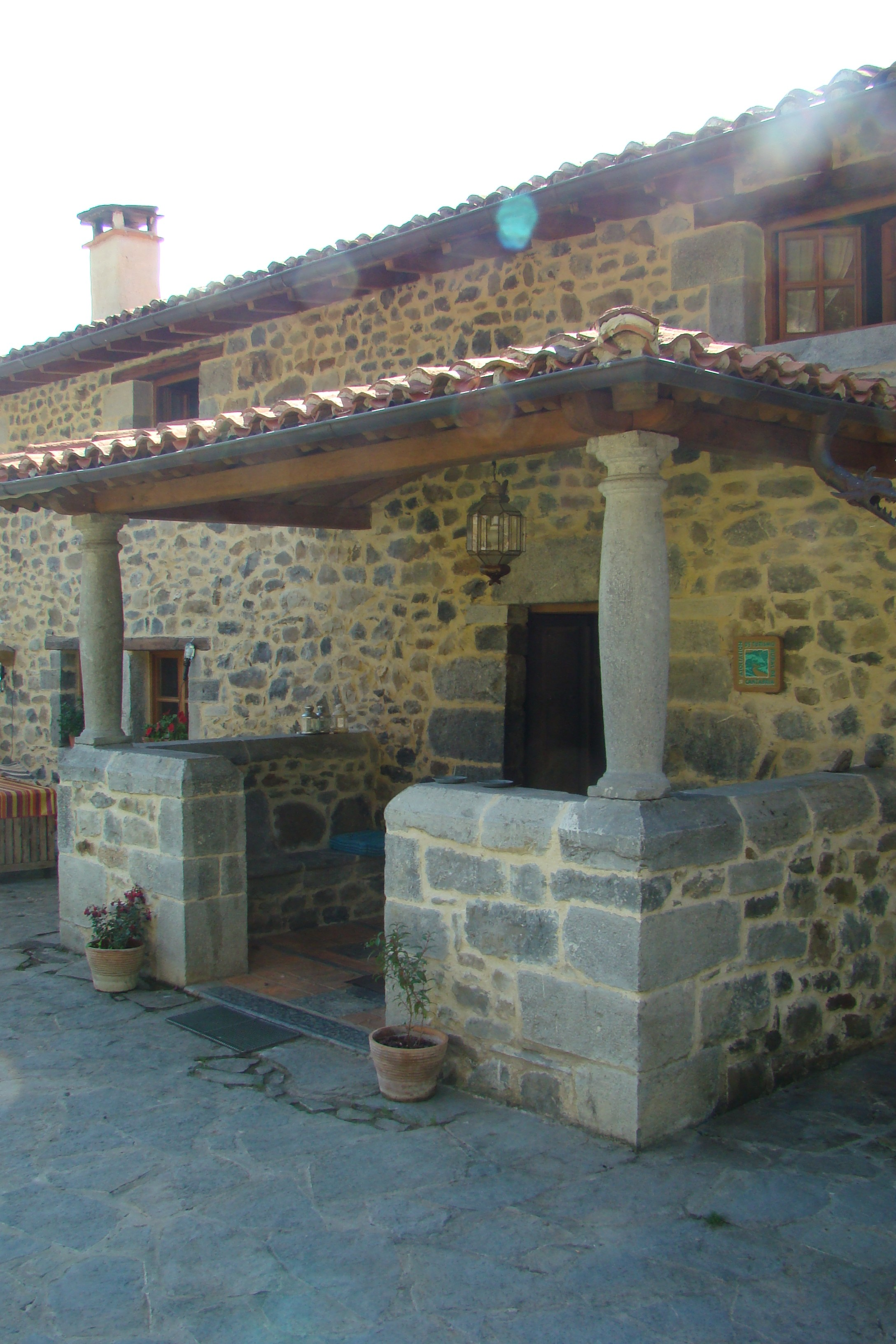 Ejemplo de patín en edificio urbano, en Regules (Soba)